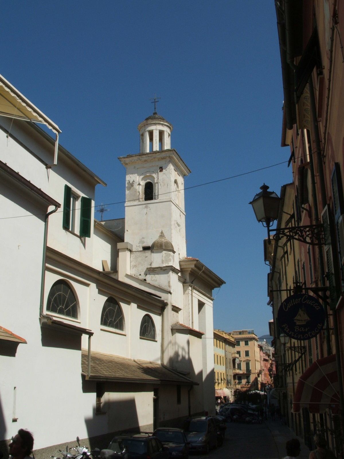 Immagine da Sestri Levante